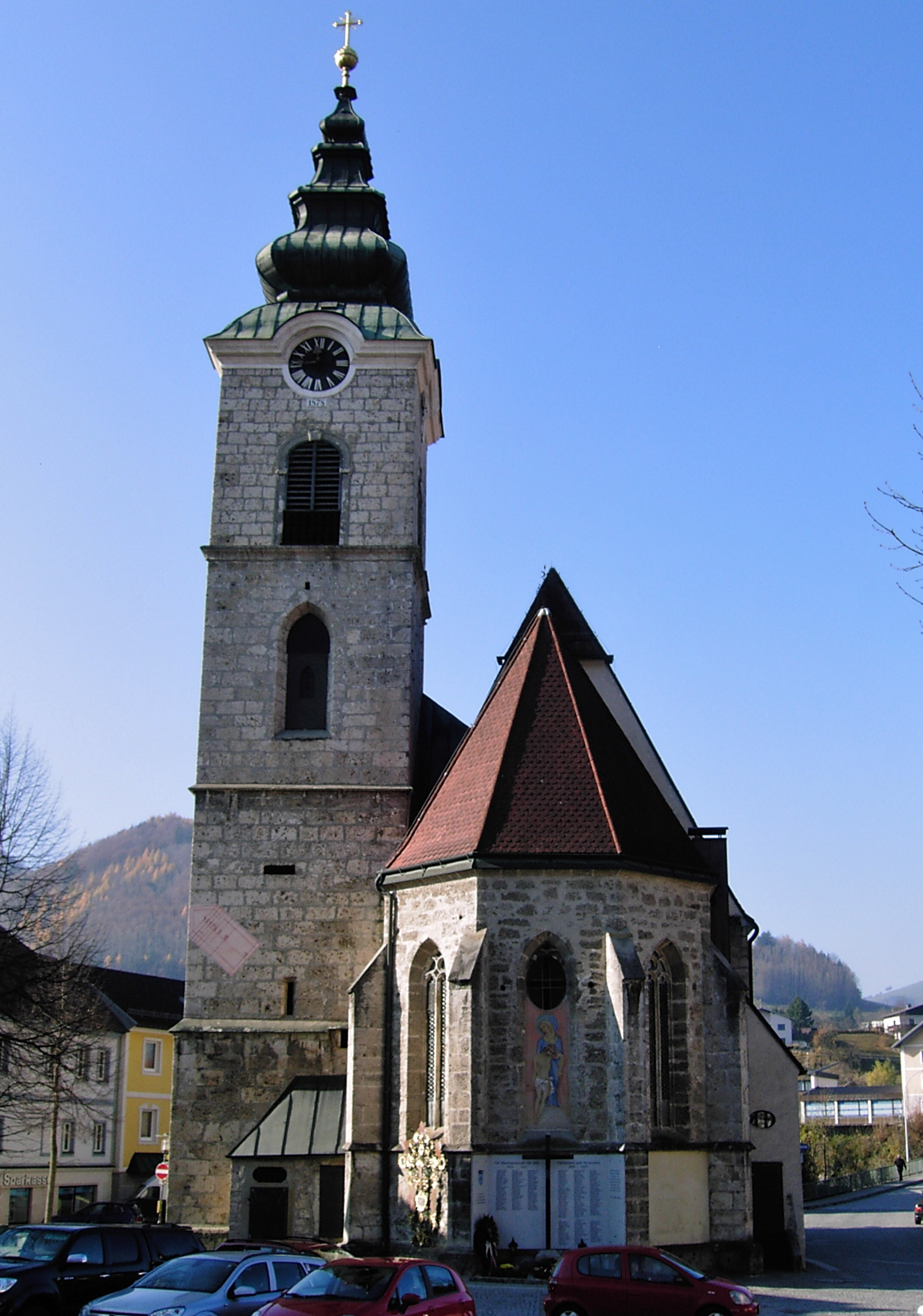 Ternberg Pfarrkirche hll.Peter und Paul Kirchenplatz 1